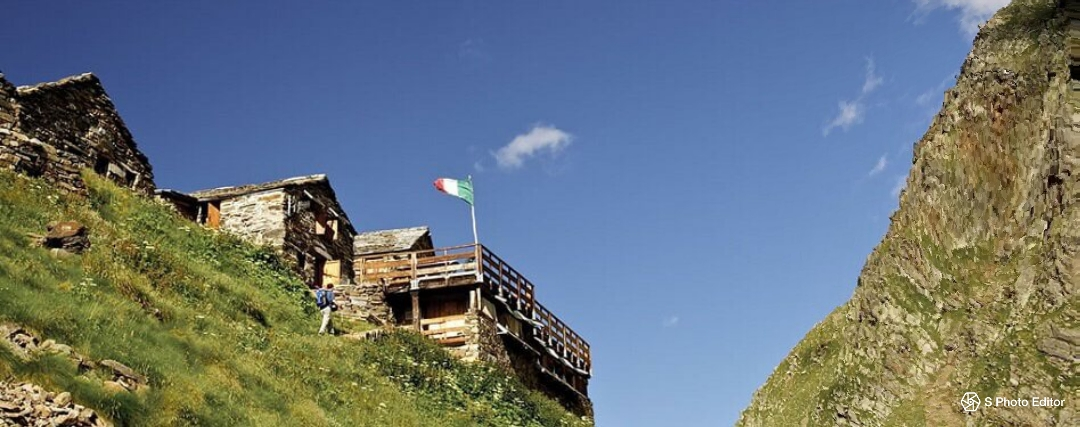 Rifugio situato in Valsesia sotto al Monte Tagliaferro presso il colle Mud